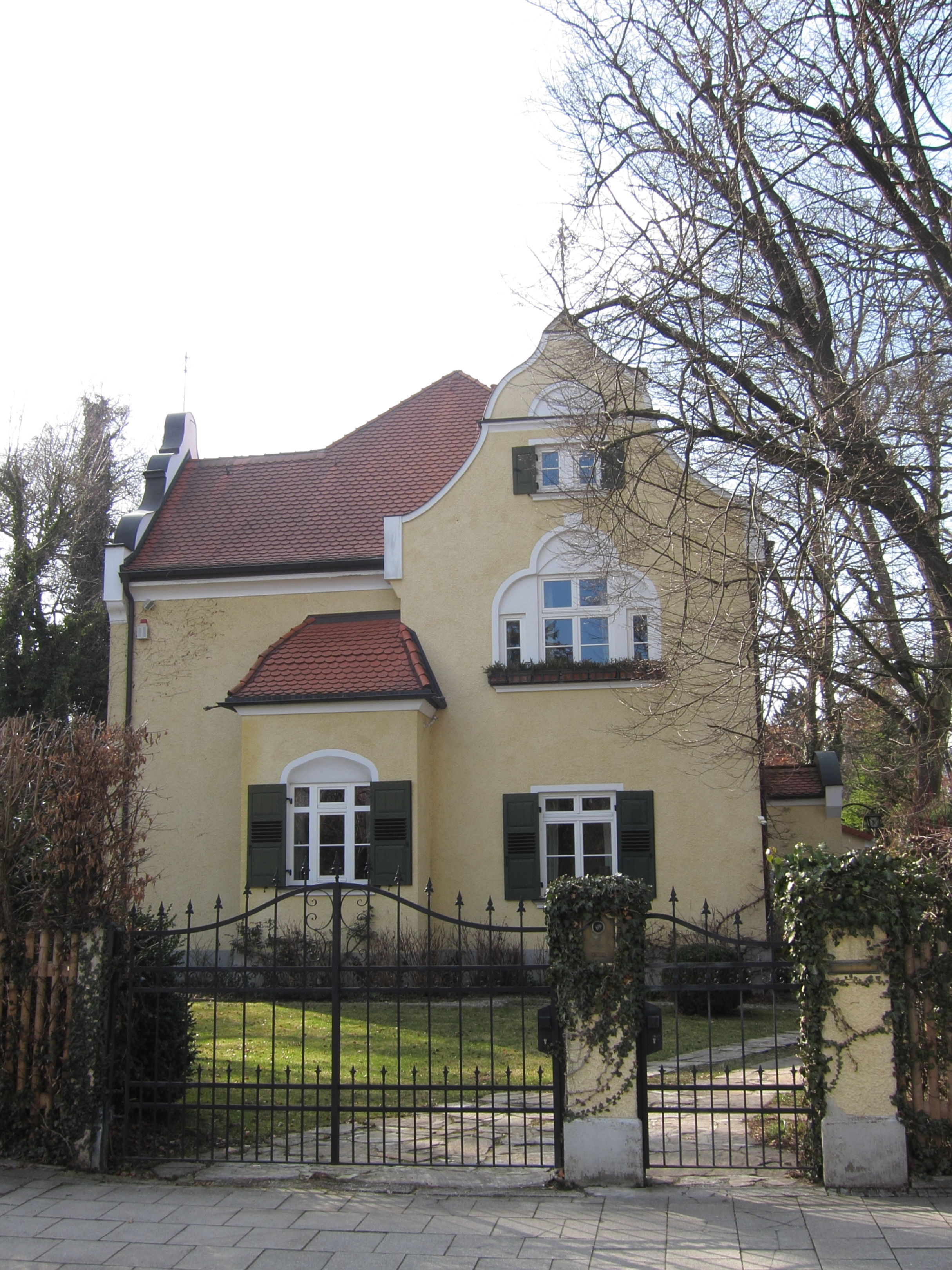 Floßmannstraße 31; Villa, historisierend, um 1895 aus dem Büro August Exter.